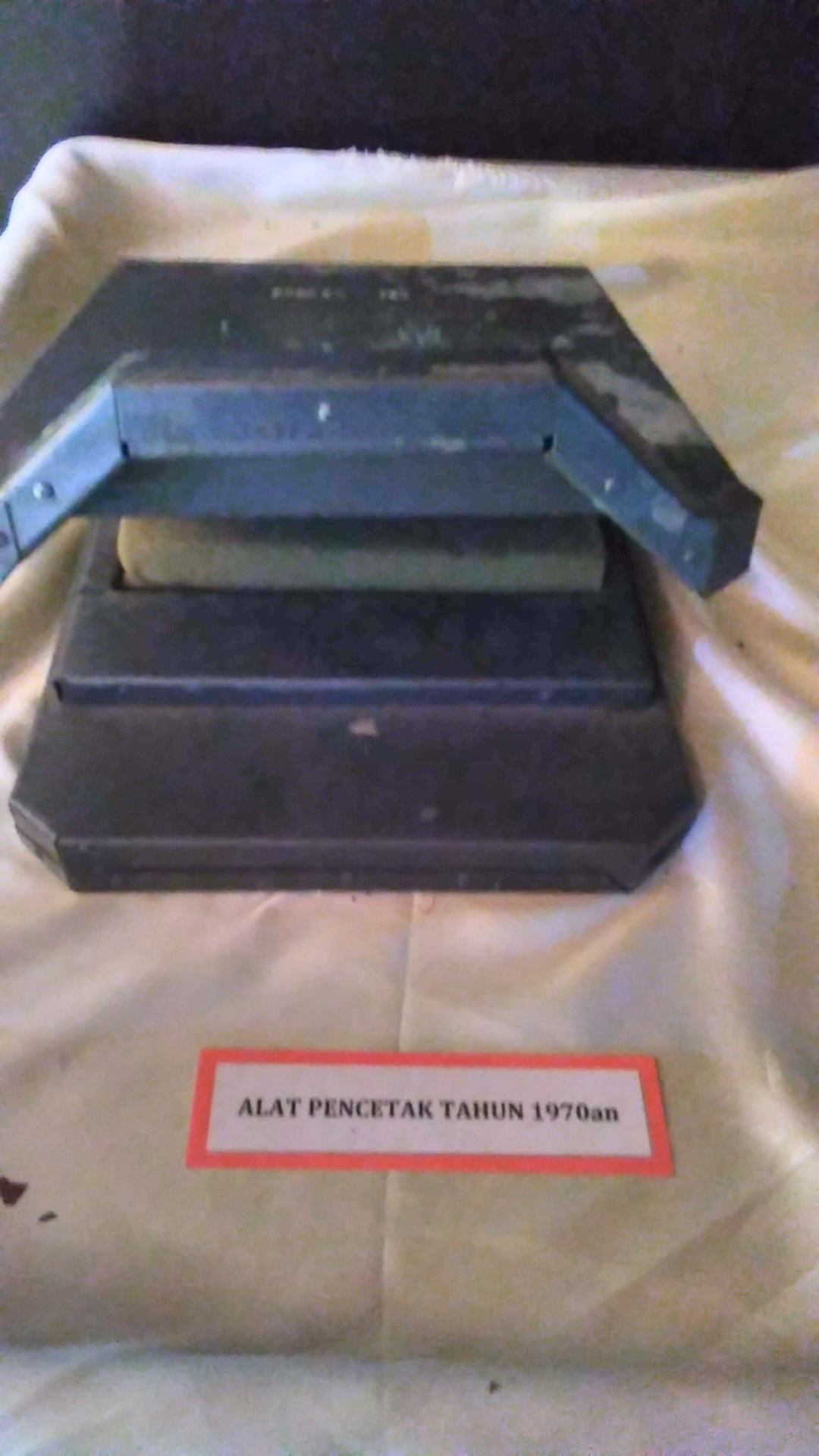 Alat Pencetak 1970